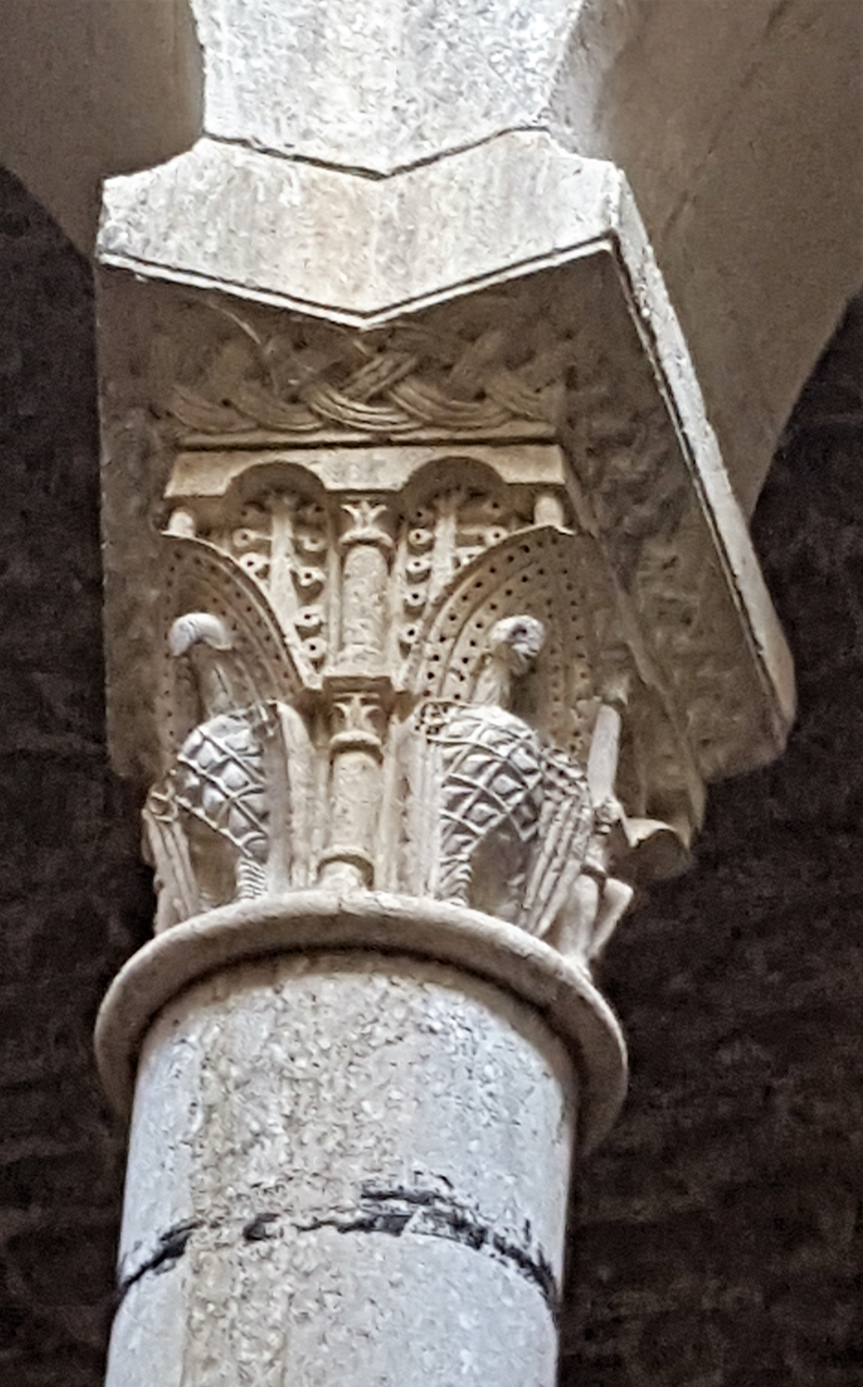 Kapitell im Apdyterium der Arabischen Bäder (Banys Àrabs) in Girona, Katalonien